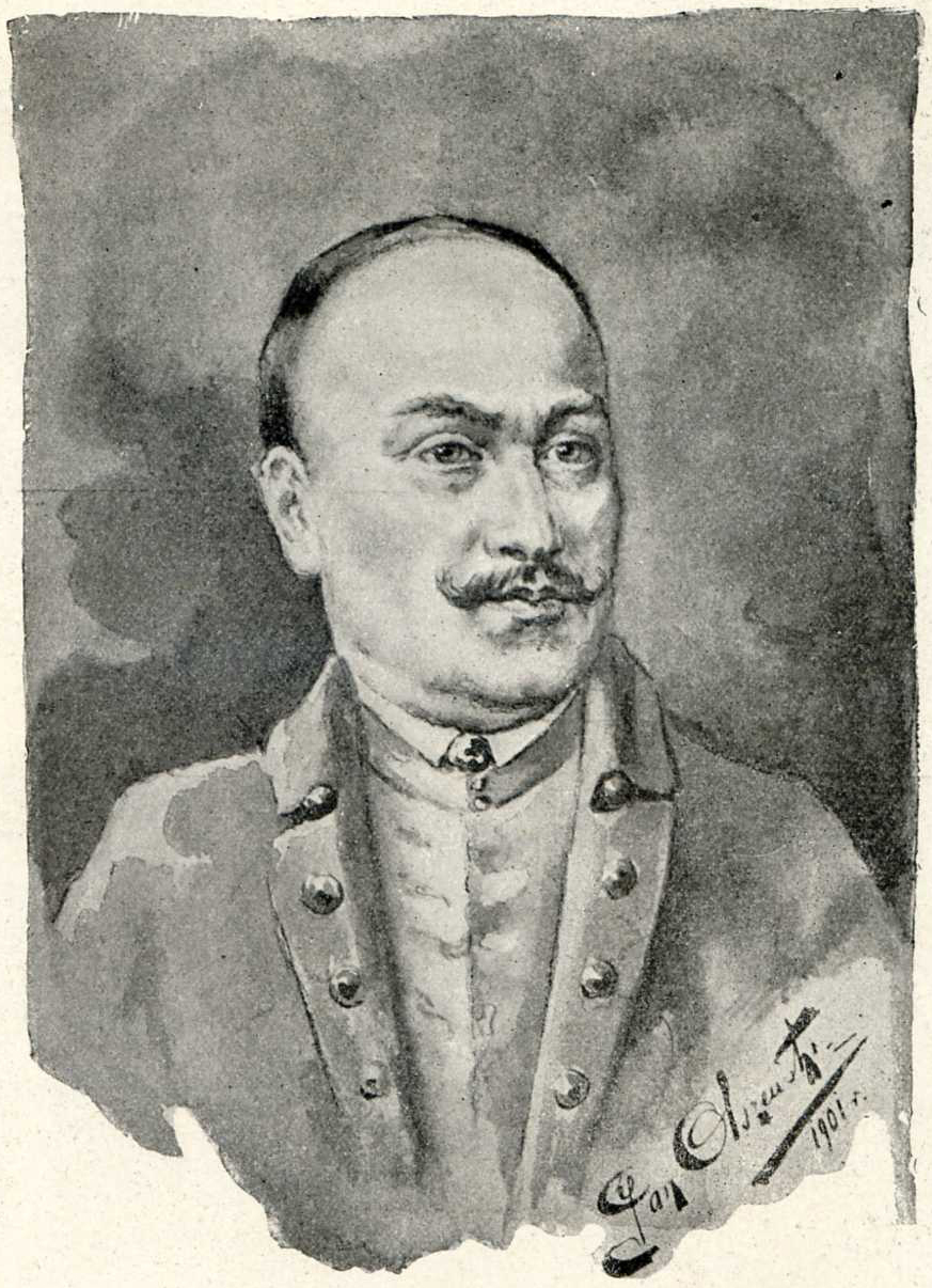 Andrzej Ogiński Беларуская (тарашкевіца): Партрэт Андрэя Агінскага (Andrej Aginski)